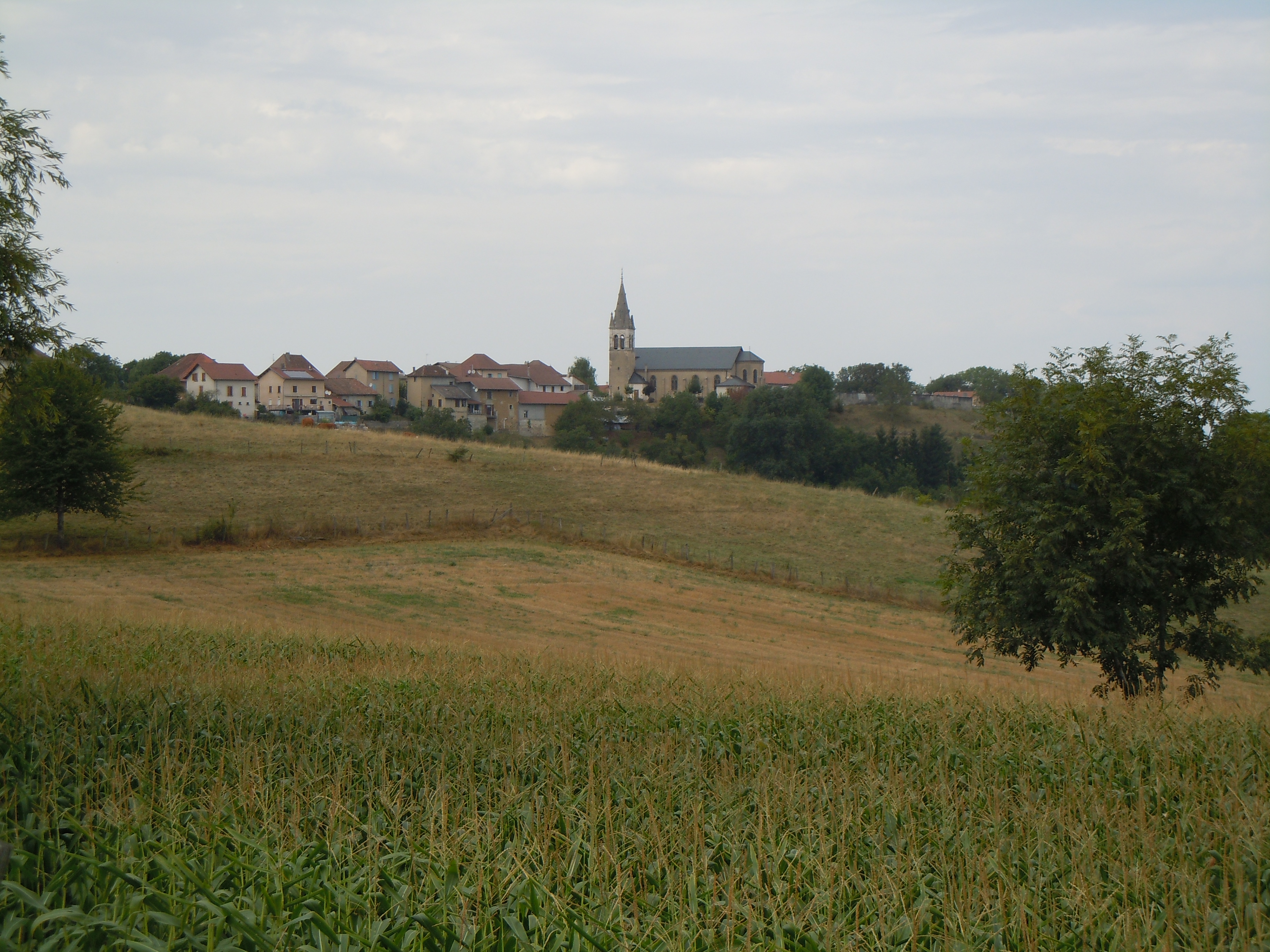 La Bâtie-Divisin - Isère - France